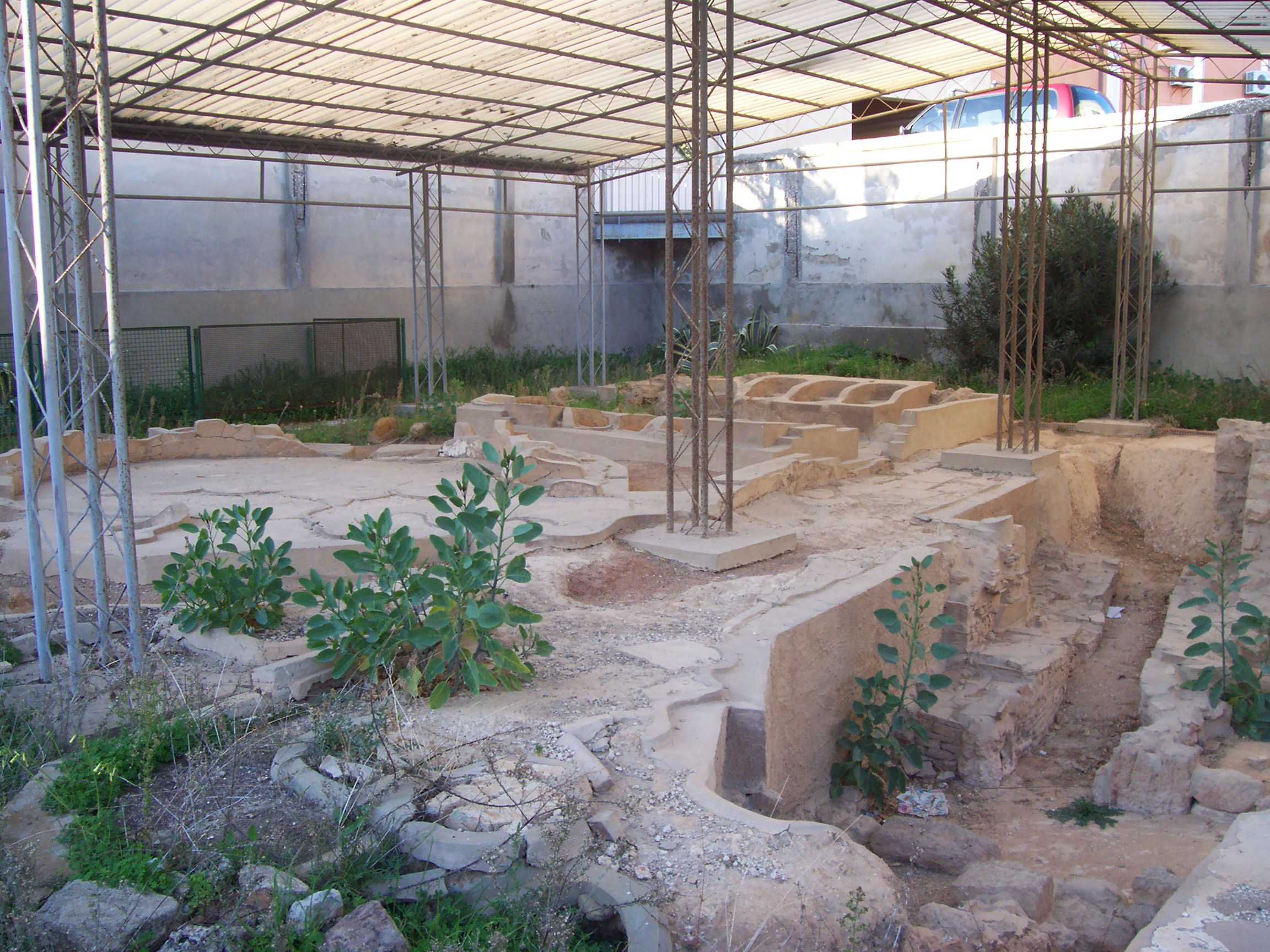 Bagni ellenistici a Gela (IV-III secolo a.C.) Licensing Categoria:Gela Categoria:Siti archeologici della Sicilia